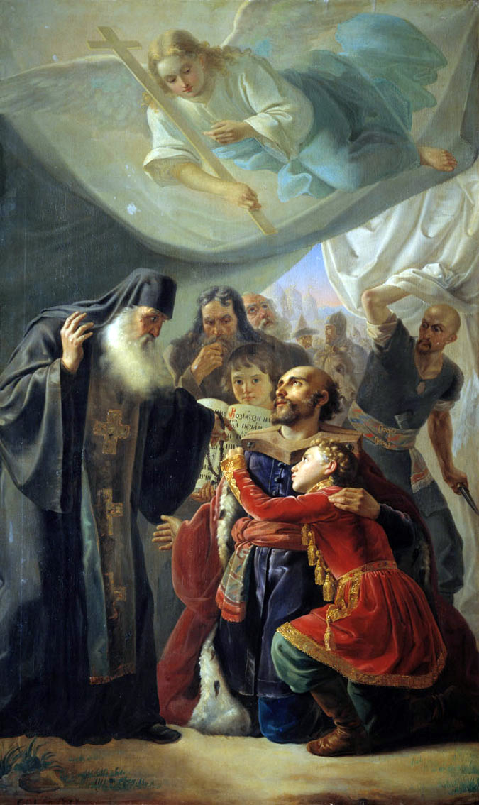 Это картина русского художника Пимена Никитича Орлова «Напутствие великого князя Михаила Тверского». Картина служит иллюстрацией текста Карамзина о смерти михаила Тверского в 1317 году Михаил сведал и не ужаснулся; отслушав Заутреню (ибо с ним были Игумен и два Священника), благословил сына своего, Константина; поручил ему сказать матери и братьям, что он умирает их нежным другом; что они, конечно, не оставят верных Бояр и слуг его, которые у престола и в темнице изъявляли Государю равное усердие. Час решительный наступал. Михаил, взяв у священника Псалтирь и разогнув оную, читал слова: сердце мое смятеся во мне, и боязнь смерти нападе на мя. Душа его невольно содрогнулась. Игумен сказал ему: «Государь! В сем же Псалме, столь тебе известном, написано: возверзи на Господа печаль твою». Великий Князь продолжал: кто даст ми криле яко голубине? и полещу и почию... Умиленный сим живым образом свободы, он закрыл книгу, и в то самое мгновение вбежал в ставку один из его Отроков с лицом бледным, сказывая дрожащим голосом, что Князь Георгий Даниилович, Кавгадый и множество народа приближаются к шатру. «Ведаю, для чего, - ответствовал Михаил и немедленно послал юного сына своего к Царице, именем Баялыни, будучи уверен в ее жалости. Георгий и Кавгадый остановились близ шатра, на площади, и сошли с коней, отрядив убийц совершить беззаконие.